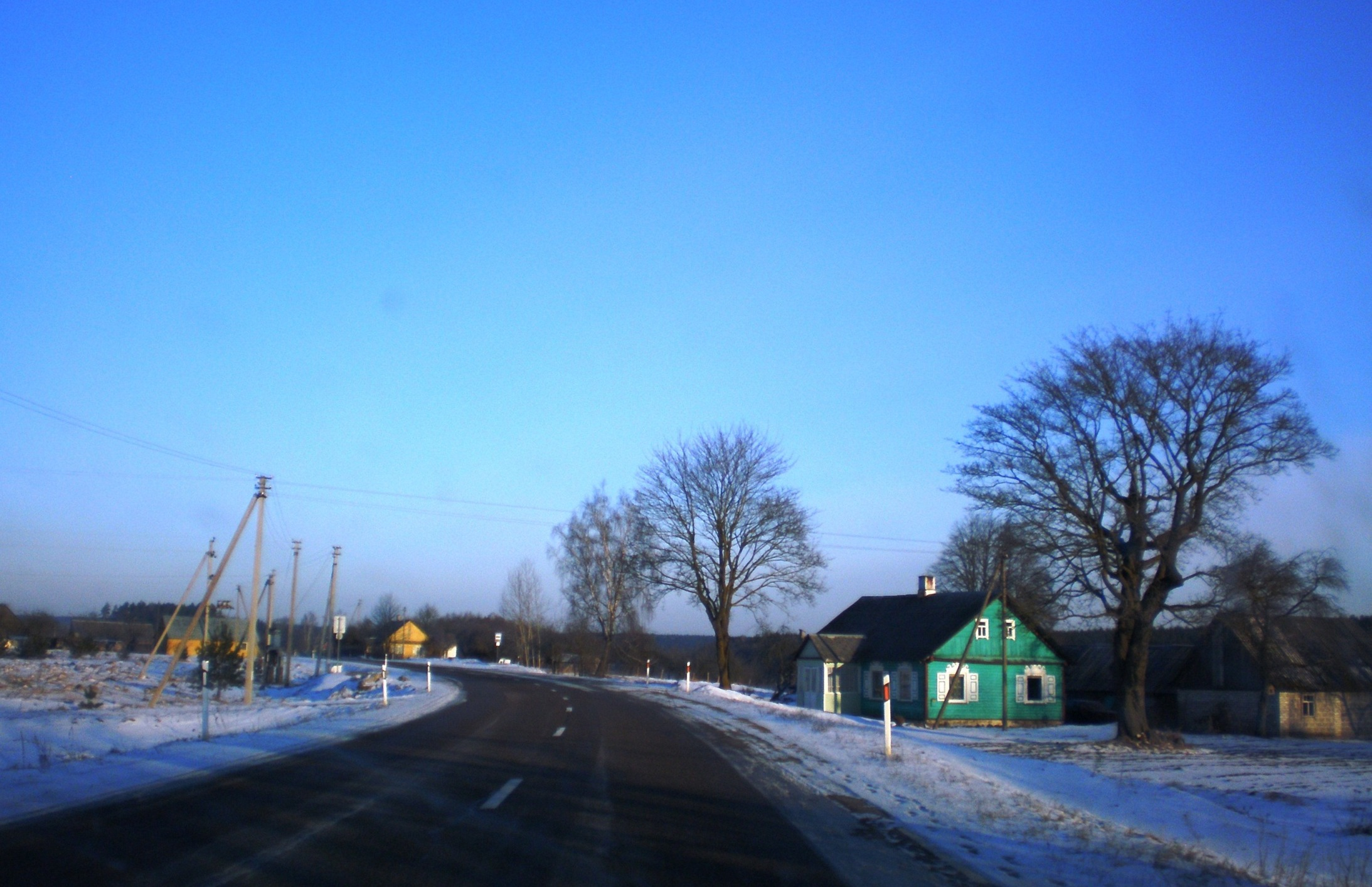 Putriškės, Kaišiadorių raj.